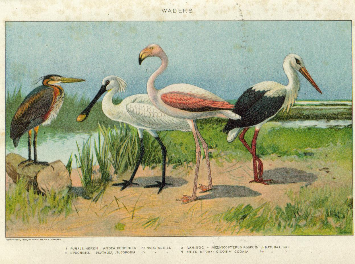 Painting